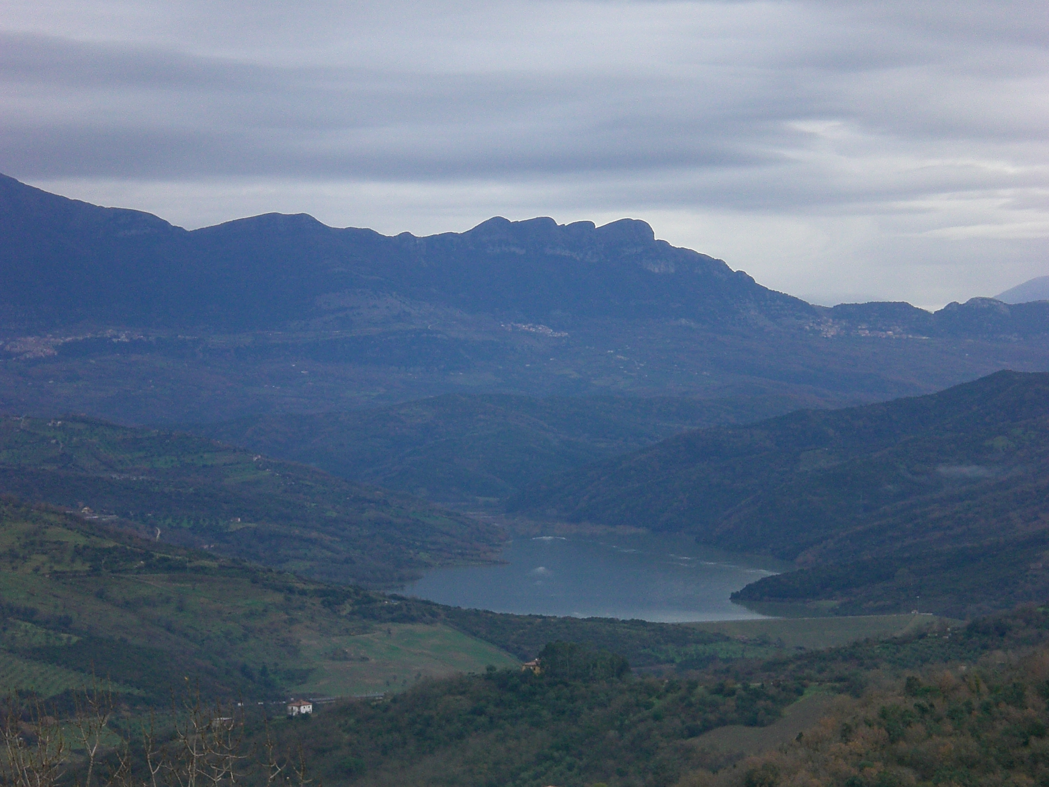 Lago artificiale del fiume Alento, nel Cilento.